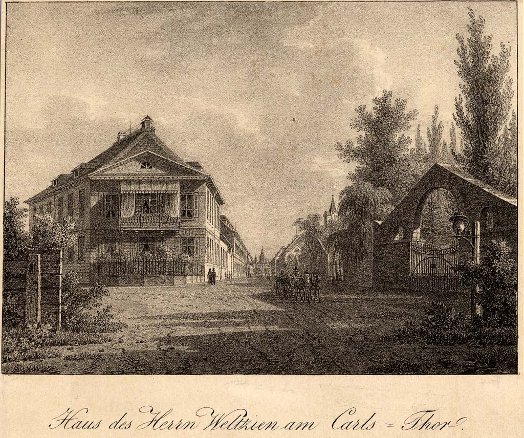 Das Wohnhaus Karl Weltziens in der Karlstraße, heute als „Weltzien-Haus„ bekannt, wurde 1822 - 1823 wahrscheinlich nach Plänen von Friedrich Weinbrenner erbaut.